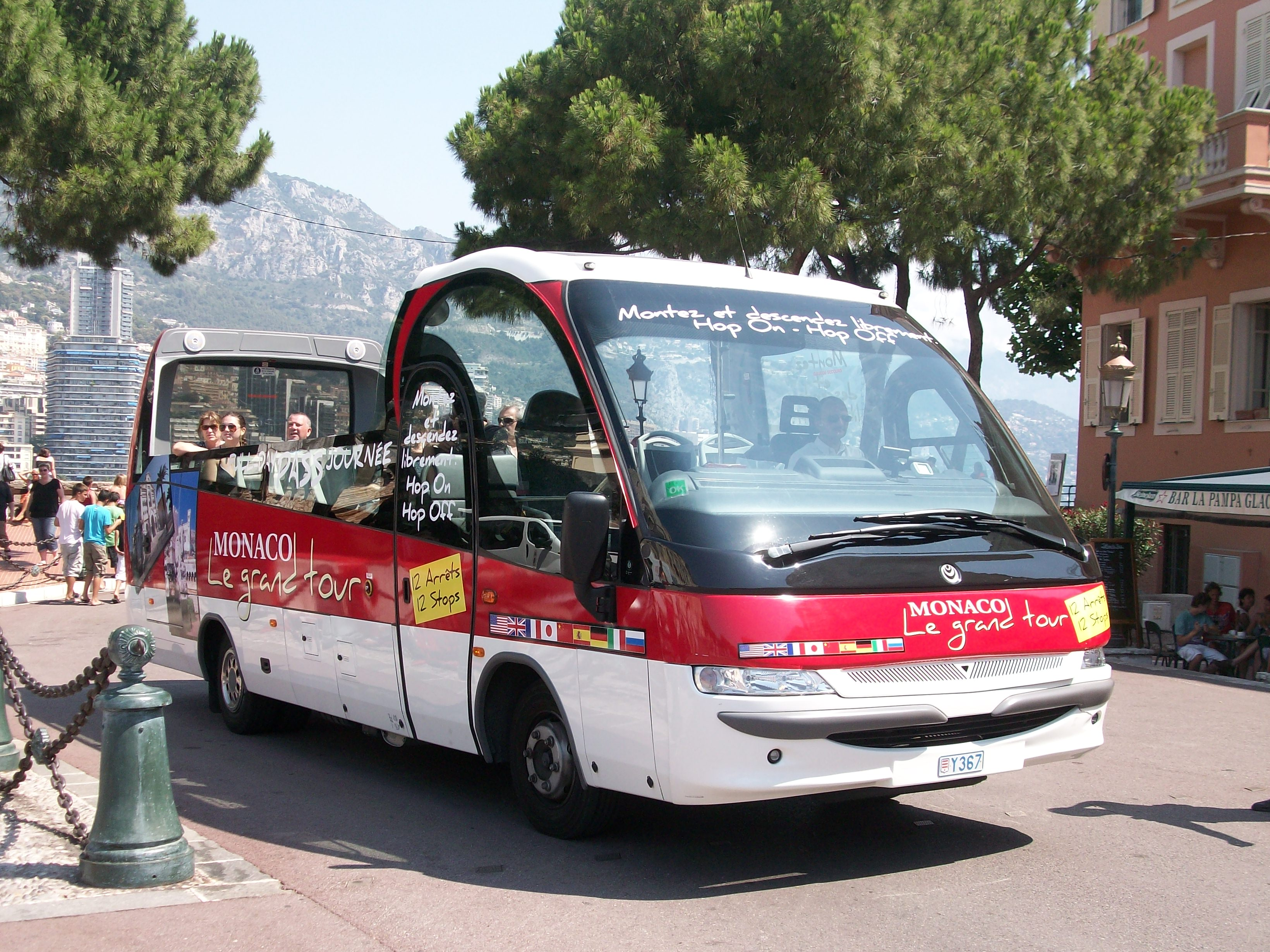 Bus "Monaco, Le grand tour!" , Monaco